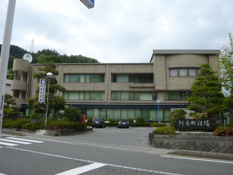 阿南町役場